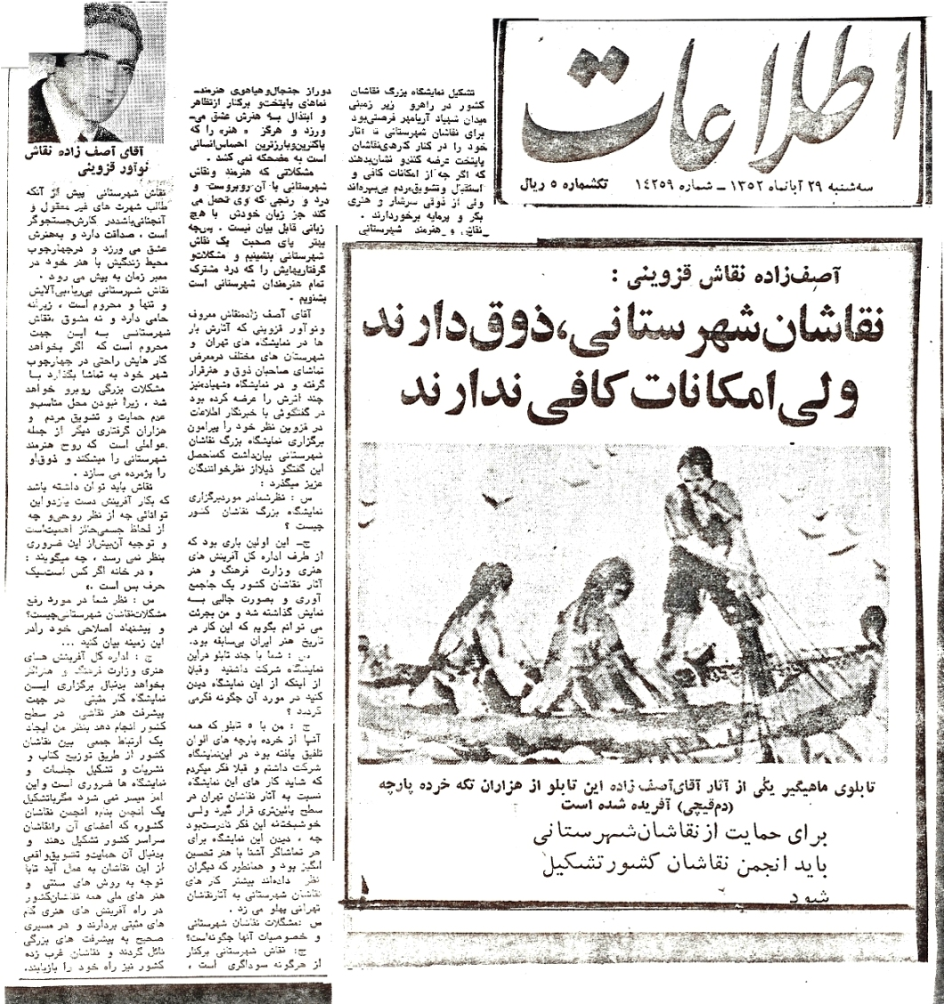 مصاحبه روزنامه اطلاعات با استاد محمد باقر آصف زاده، 1352